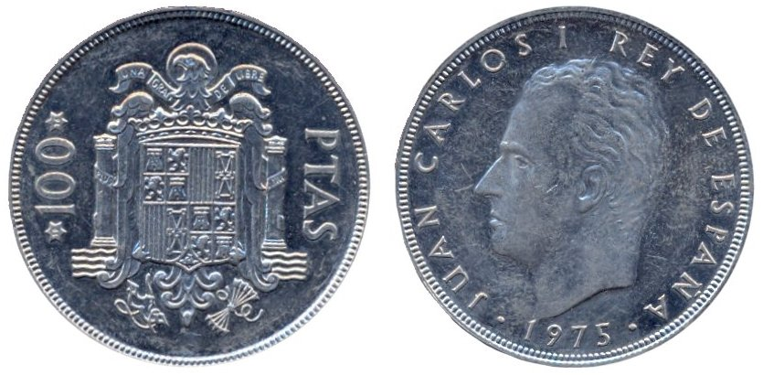 Une pièce de 100 pesetas 1975. Recto-Verso